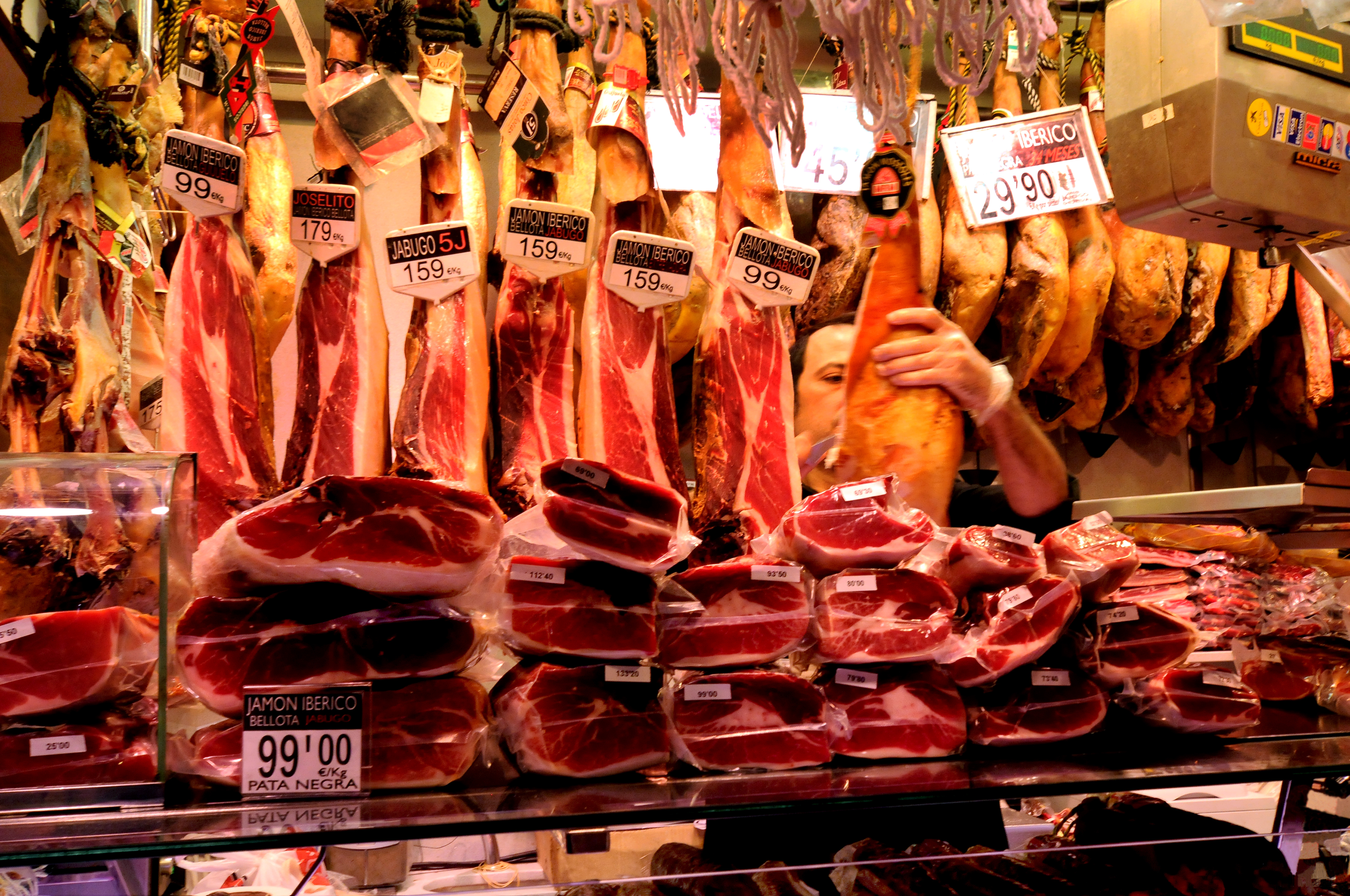 Angebot an spanischem Schinken verschiedener Arten und Sorten (vorwiegend Ibérico-Schinken verschiedener Qualitätsstufen und Herkunftsgebiete) in den La Boqueria-Markthallen in Barcelona in Spanien.